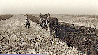 Bessarabiendeutsche Bauern beim Pflügen um 1940